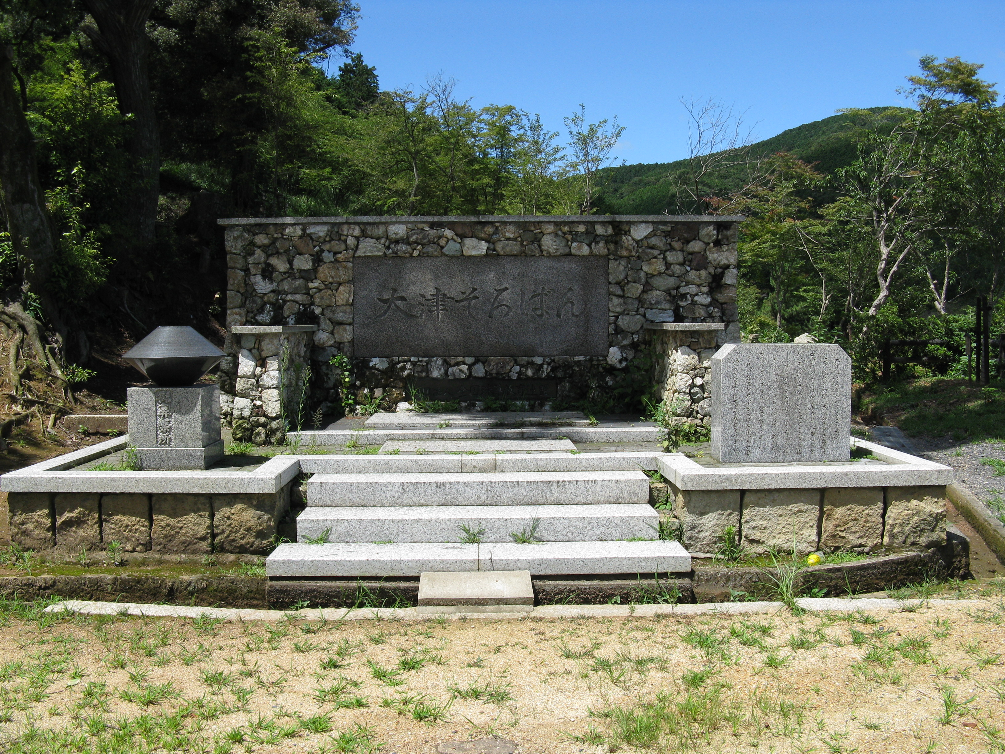 三井寺 大津そろばん